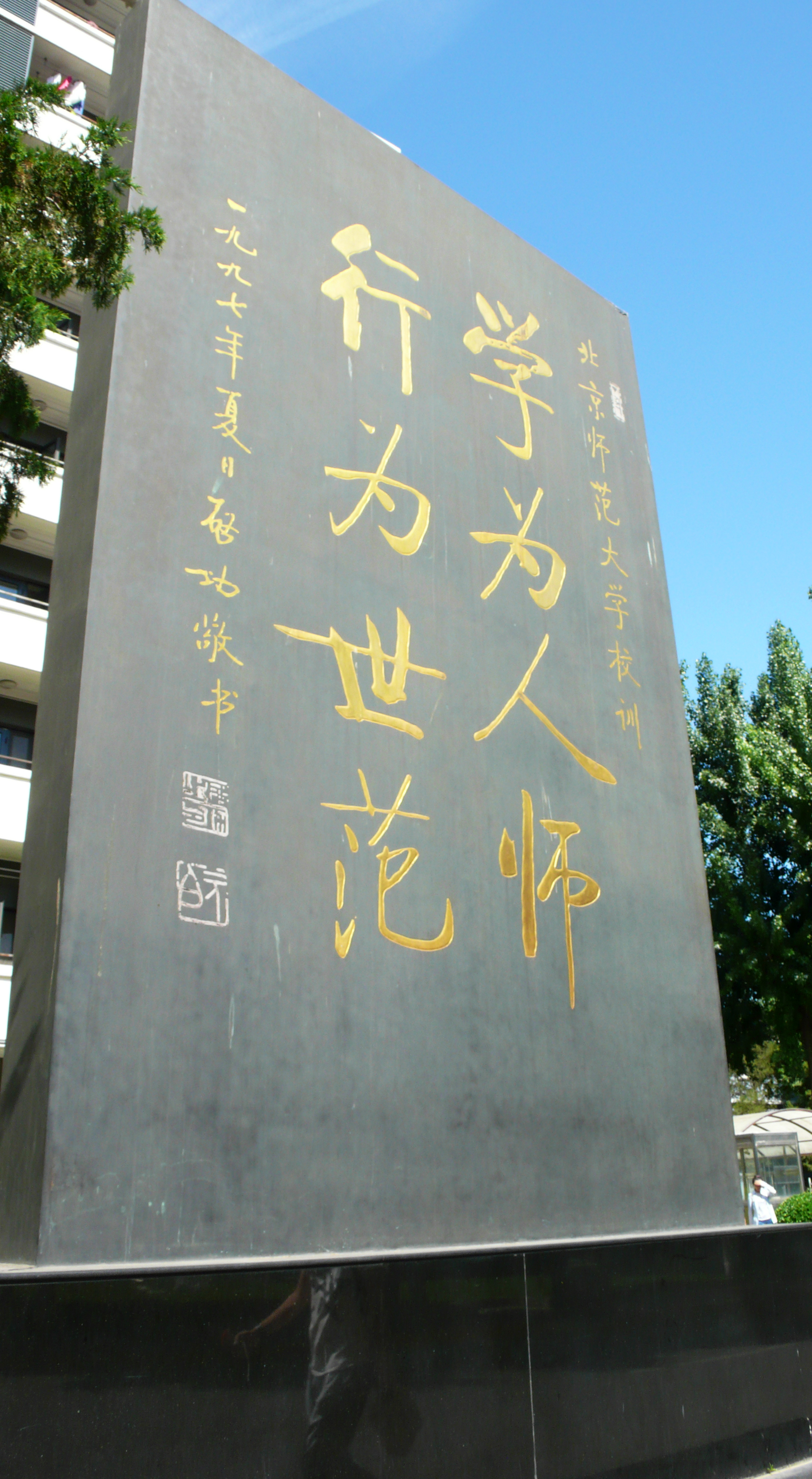 北师大校训碑。